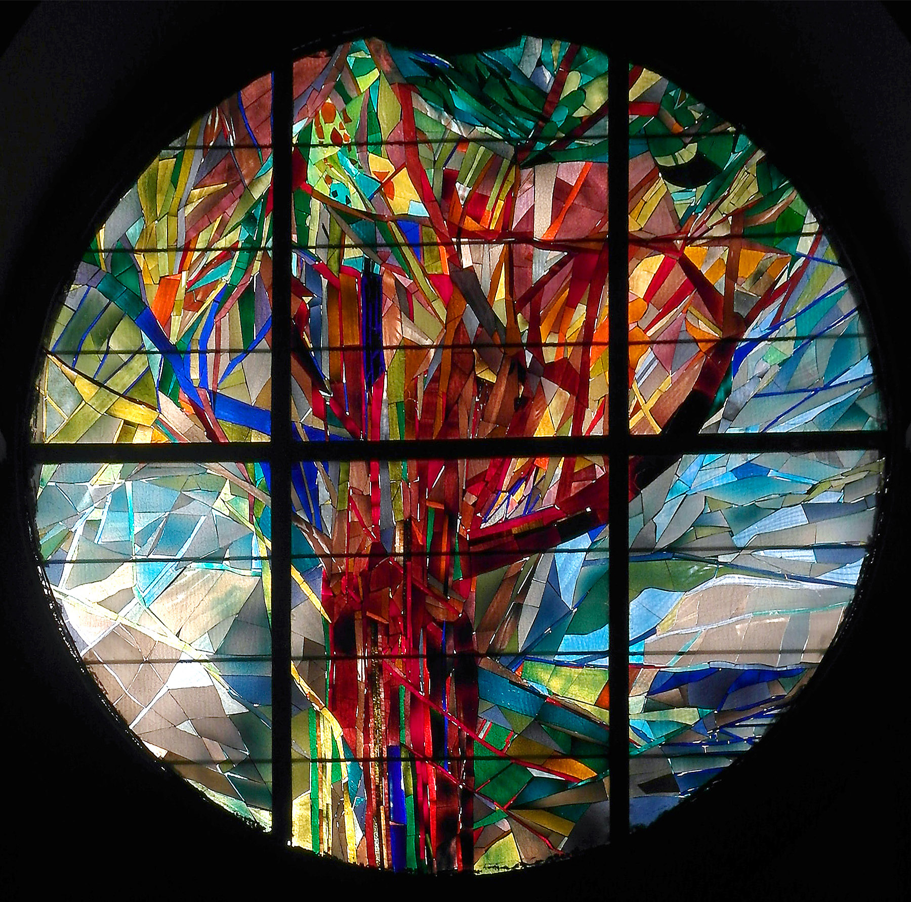 02.12.2012 01187 Dresden-Plauen, Reckestraße 6 (GMP: 51.028935,13.704658): Ev.-Luth. Auferstehungskirche. Die Glasfenster im Alttarraum schuf der Dresdner Wolfgang Korn 2000 bis 2003 neu. [SAM5218.JPG]20121202130DR.JPG(c)Blobelt